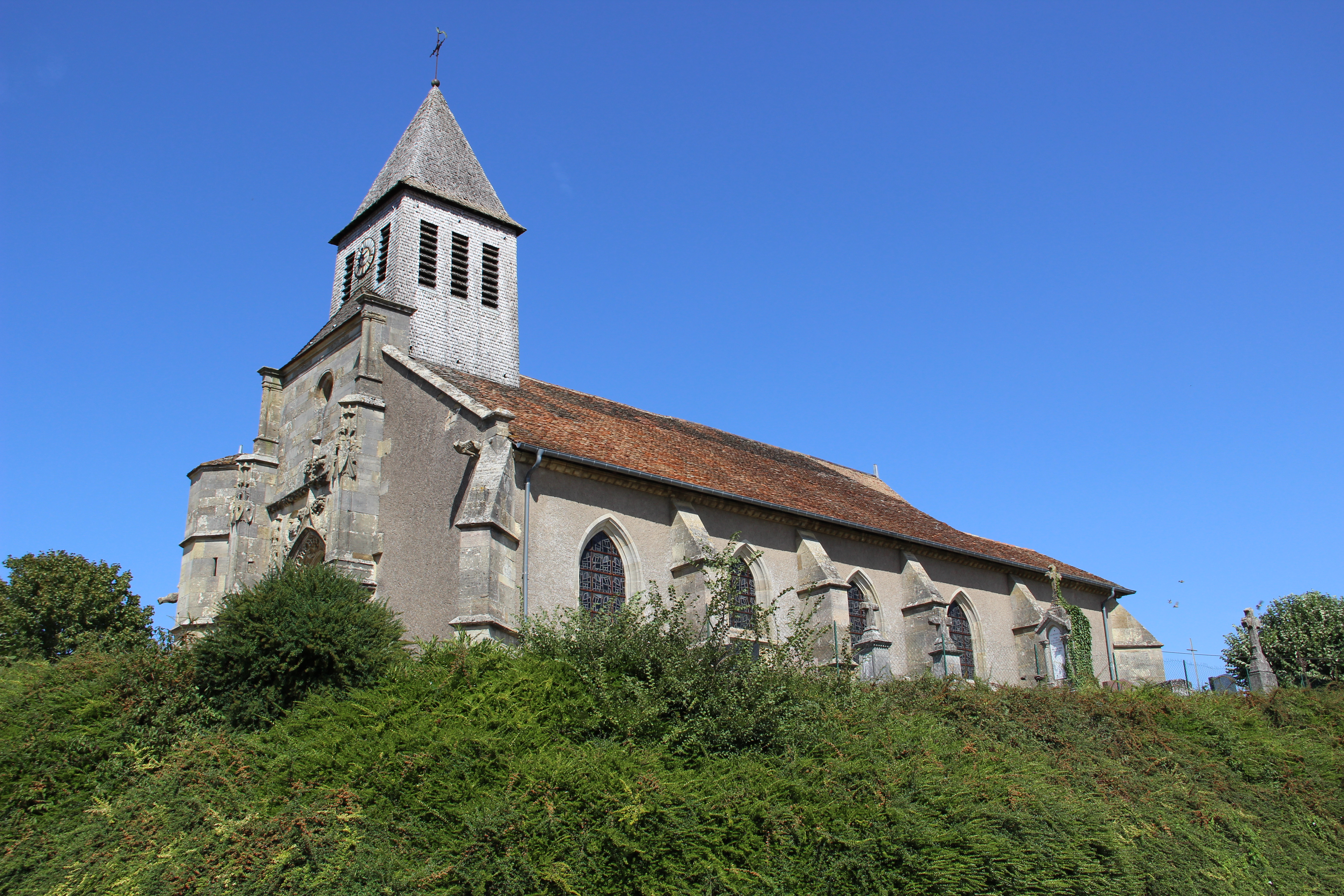 Eglise Saint-Evence